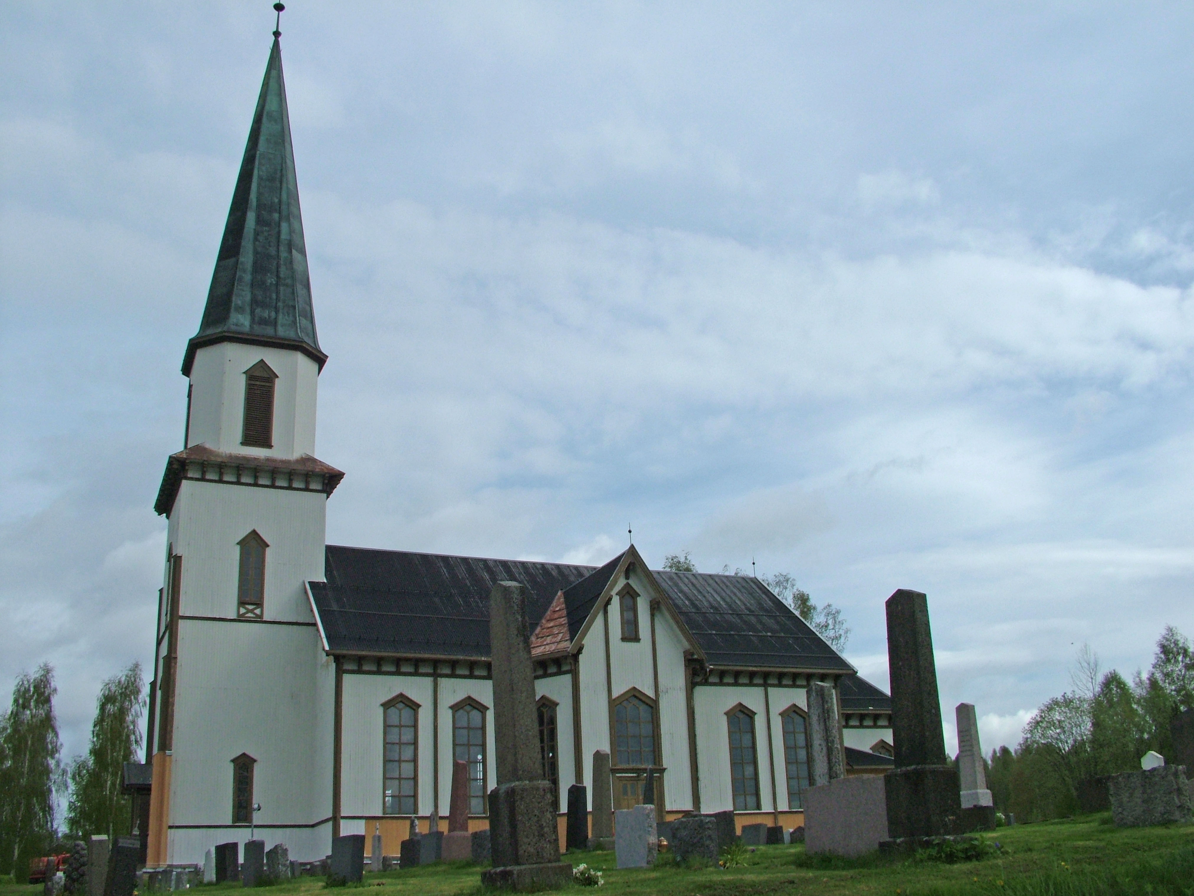 Sand kirke, Nord-Odal, Norway